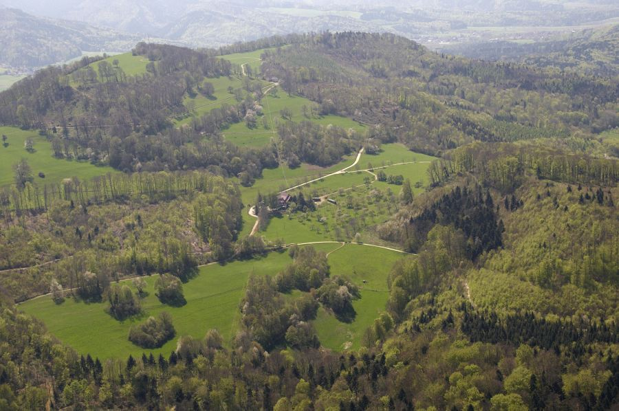 Aerial Picture Schönberg, Luftbild vom Schönberg (Ebringen) mit dem Unteren Schönberger Hof in der Bildmitte